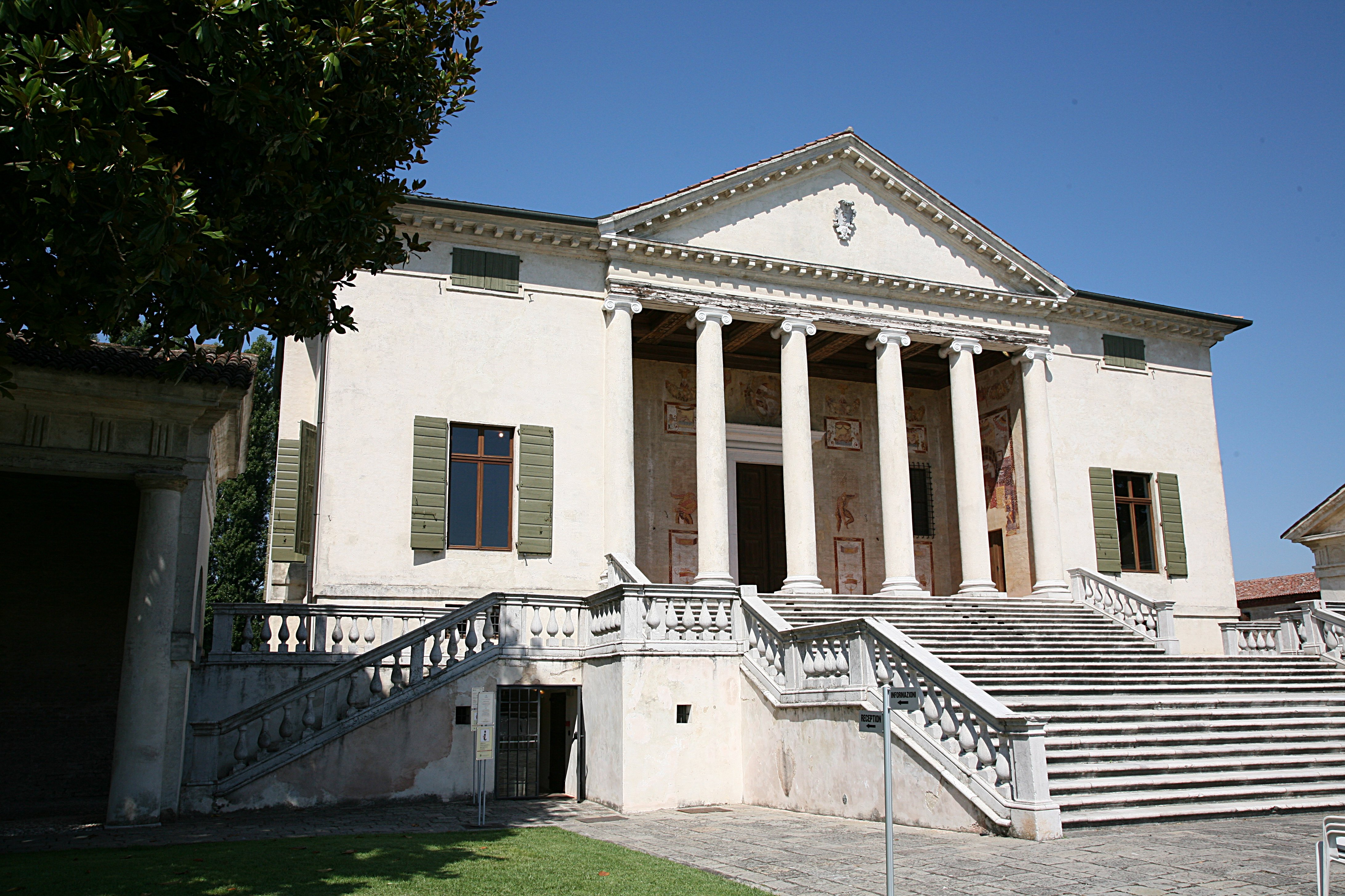 Villa Badoer by Andrea Palladio.